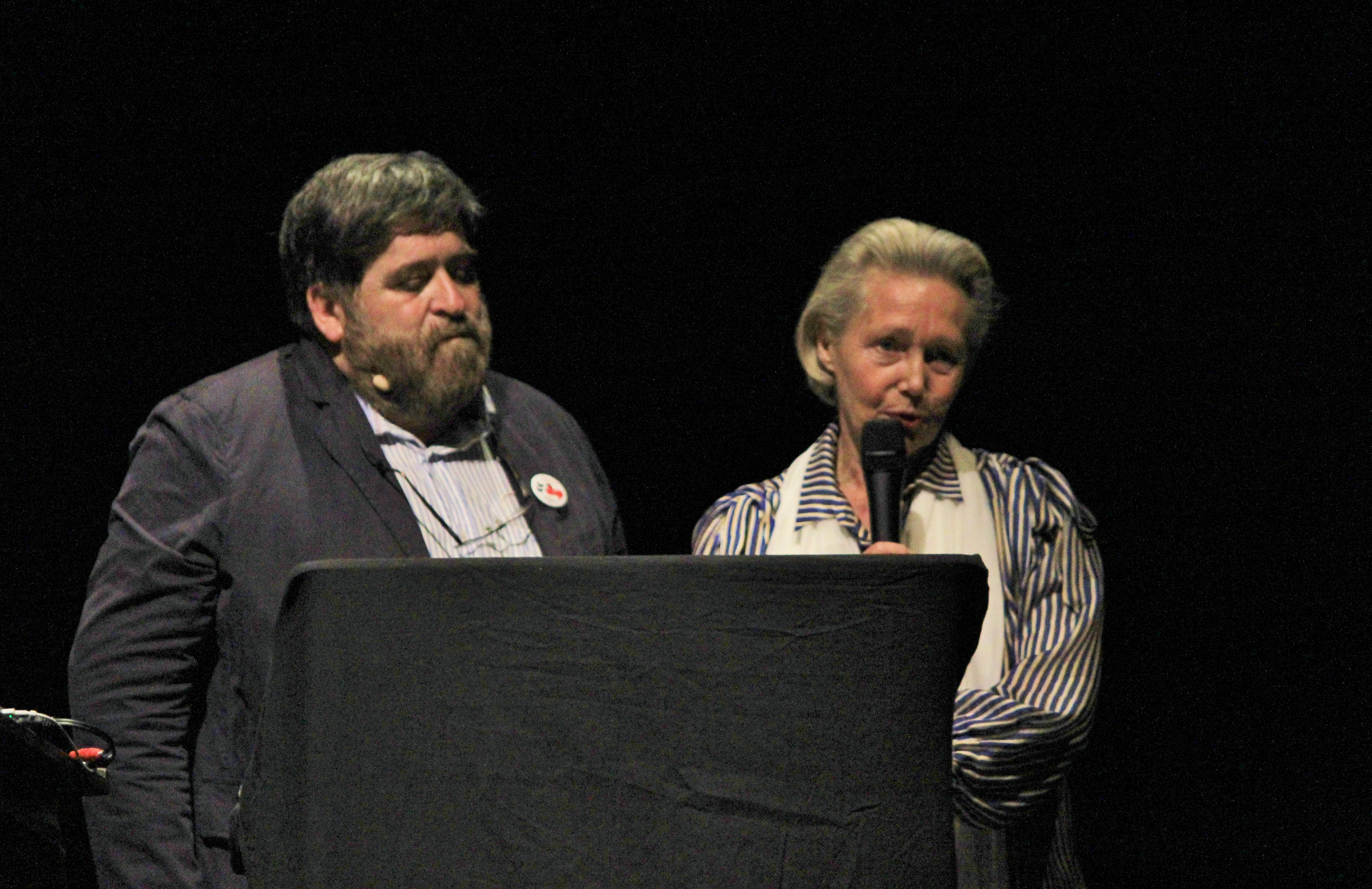 annonce de la programmation du festival interceltique de Lorient 2015. Lisardo Lombardia et la princesse Constance de Polignac